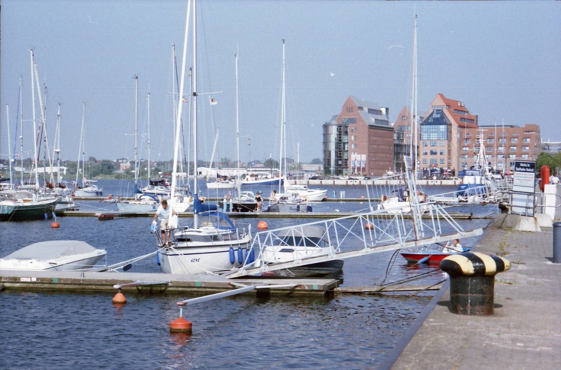 Porticciolo